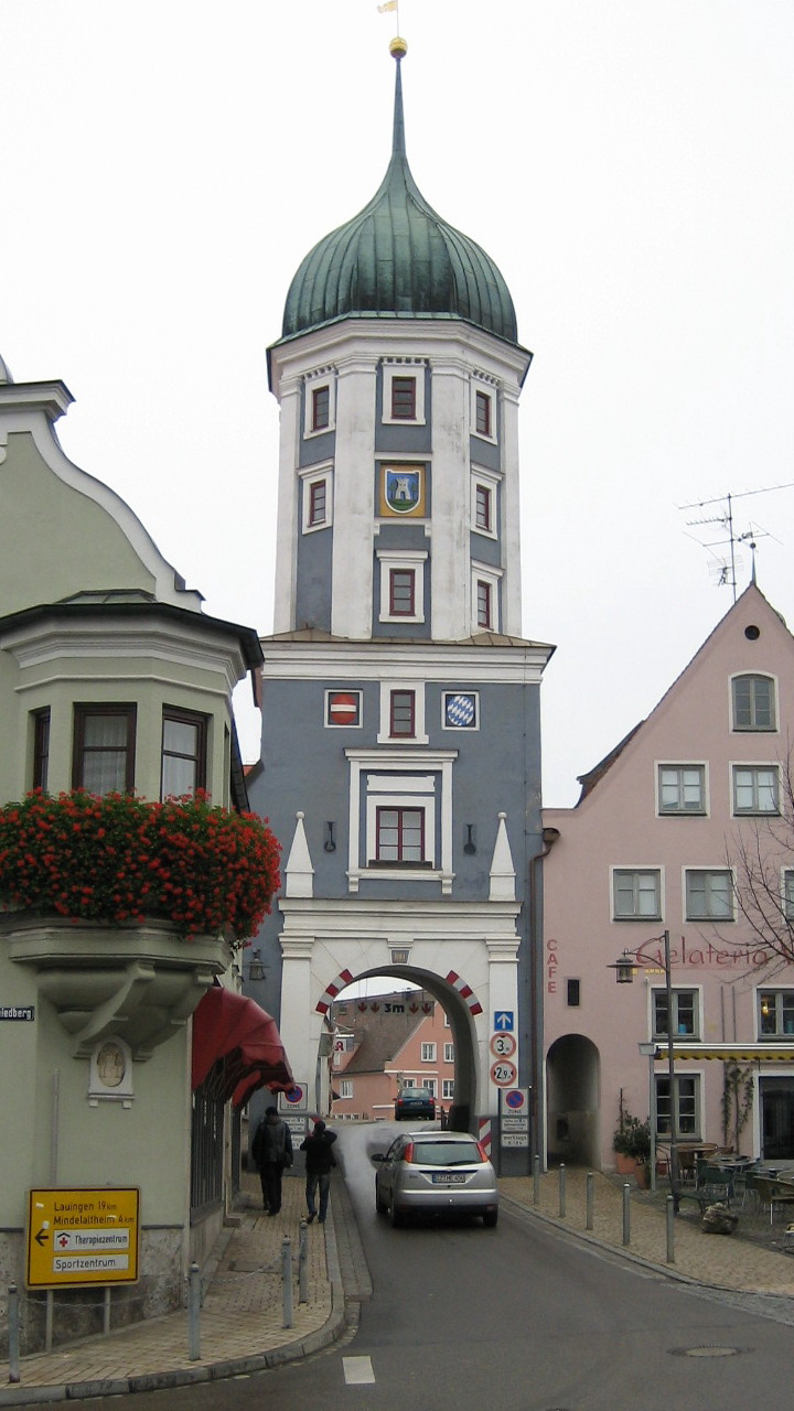 Burgau in Schwaben, früheres Stadttor ("Blockhausturm"), in Richtung stadteinwärts fotografiert